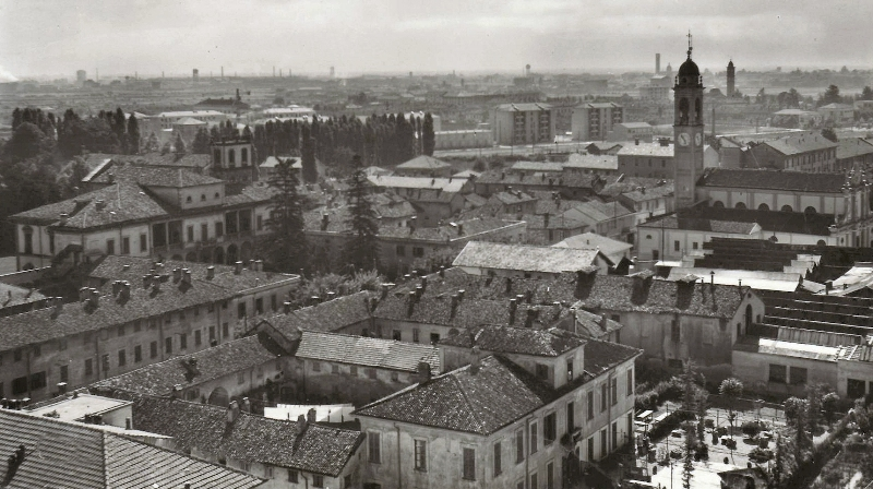 Panoramica di Cinisello dall'acquedotto cittadino.